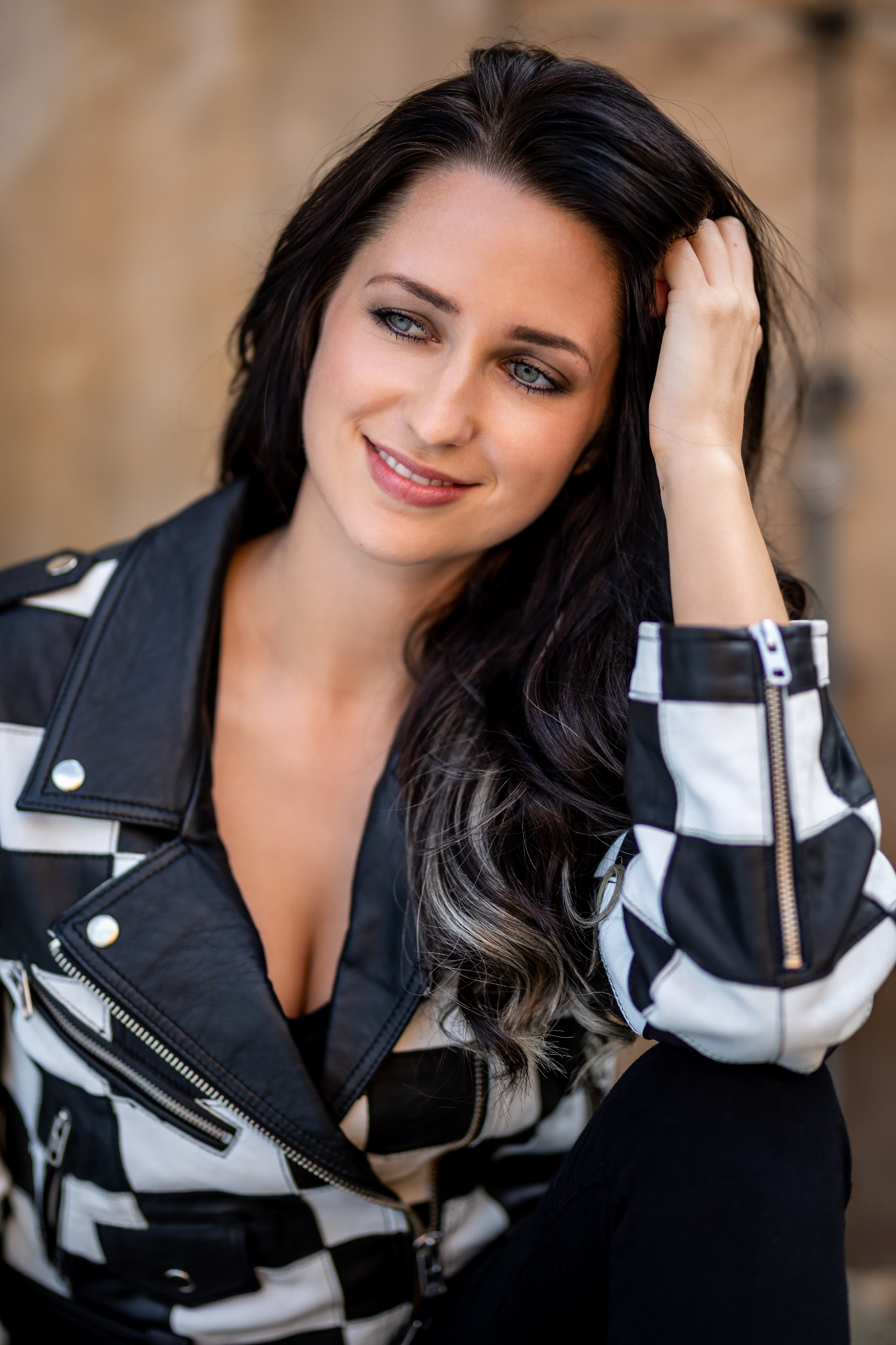 Pressefoto